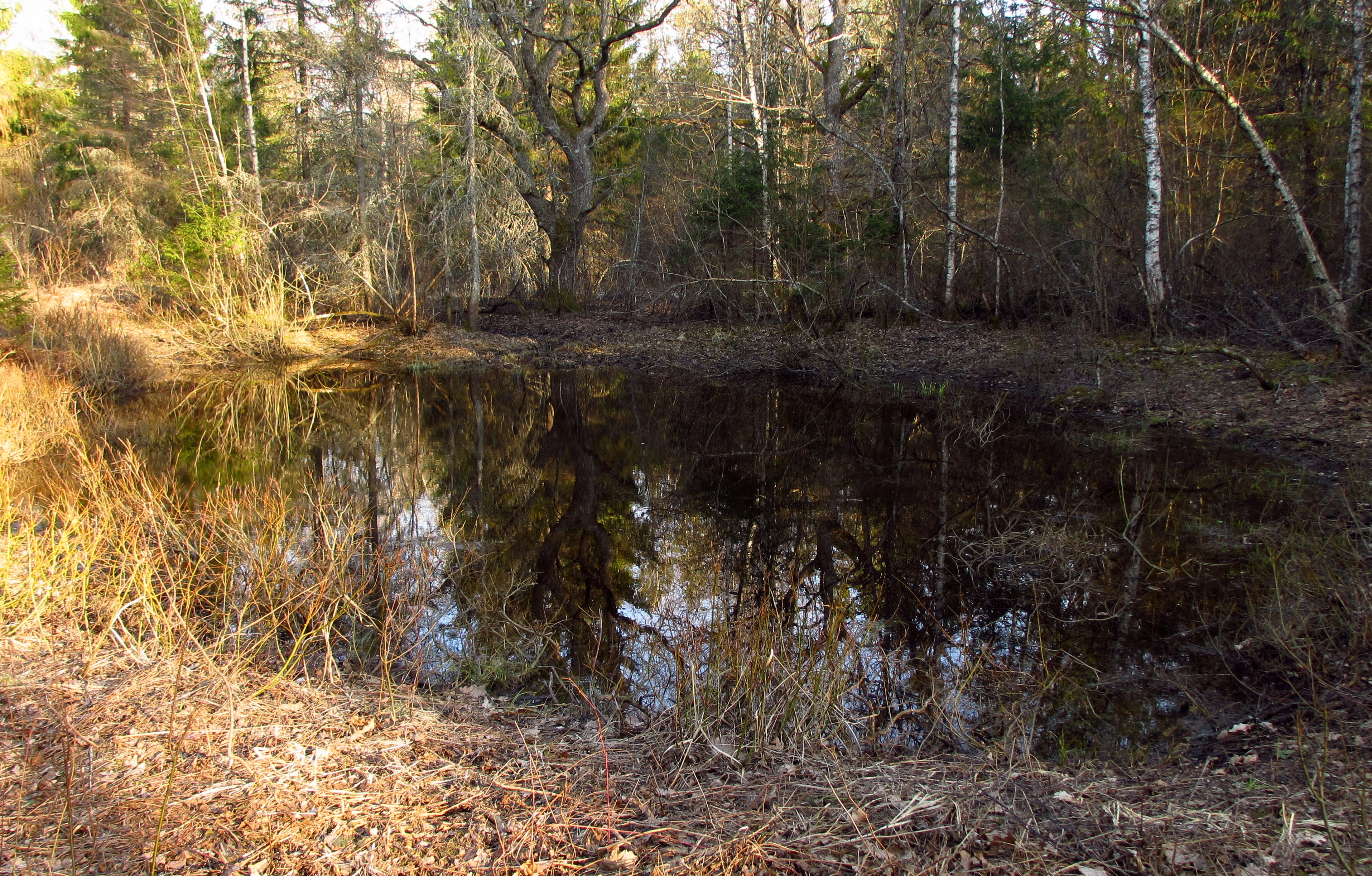 Kurisu Jaani allikas